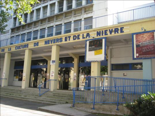 Achevée en 1969, La Maison de la Culture a connu des travaux en 1995 et accueille aujourd'hui un grand nombre de spectacles issus de tous les arts.